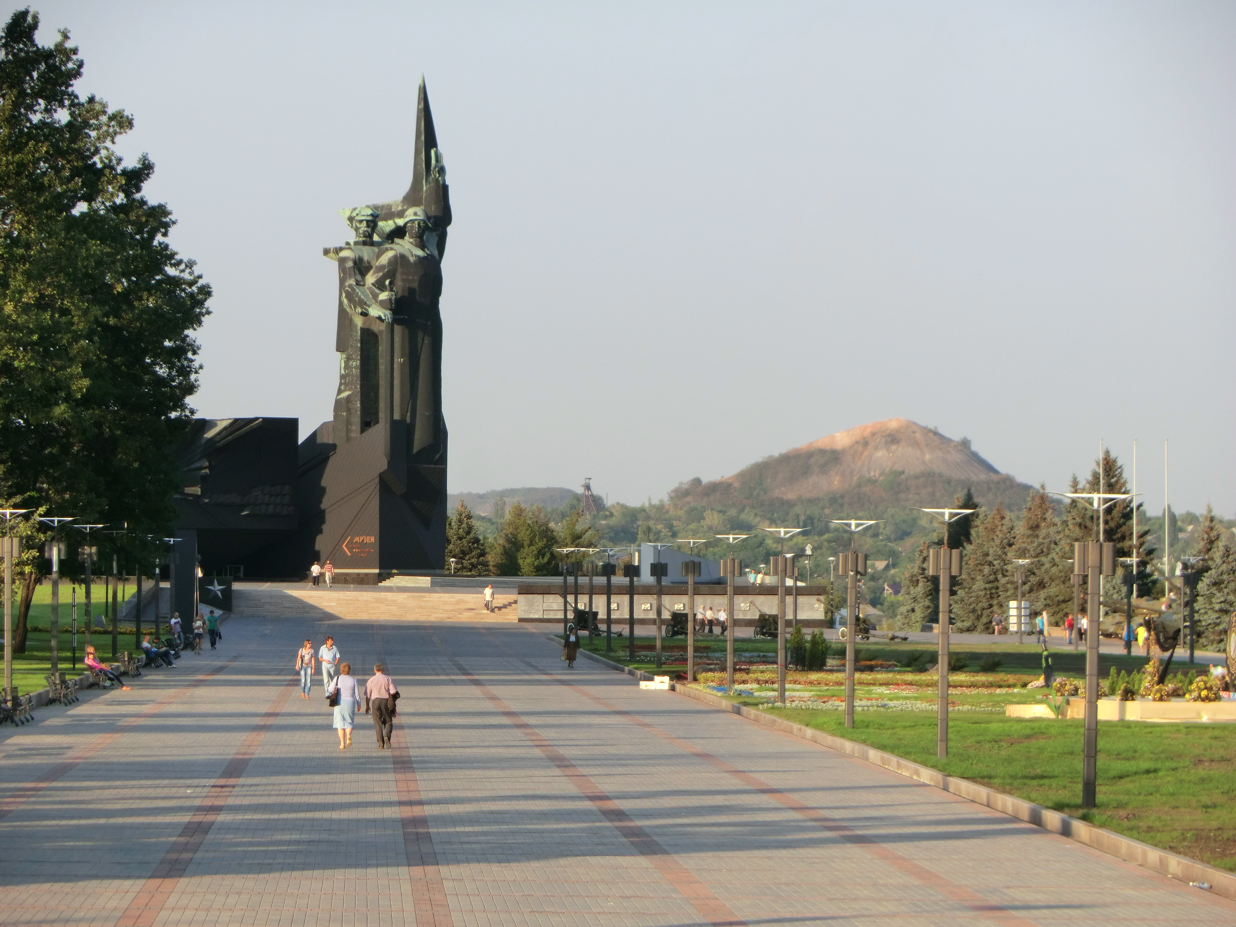 Мемориальный комплекс "Твоим освободителям, Донбасс!".